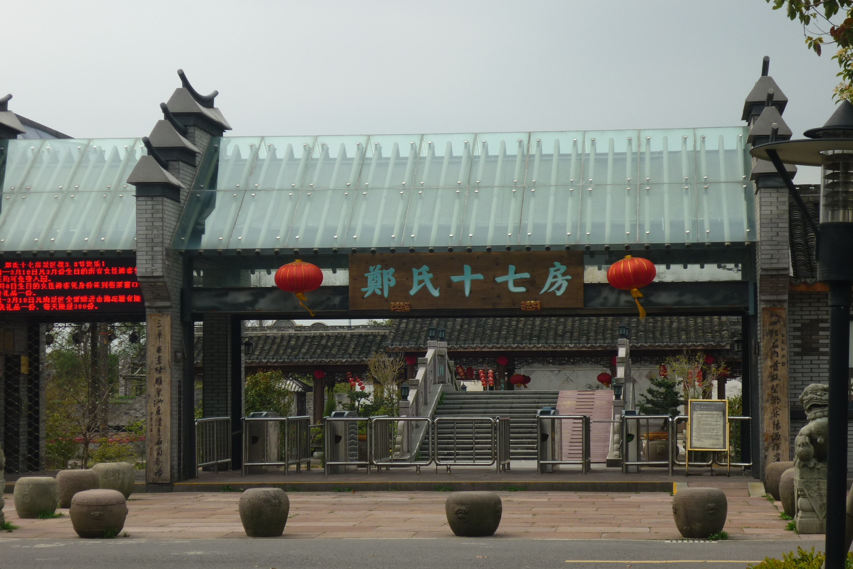 镇海郑氏十七房